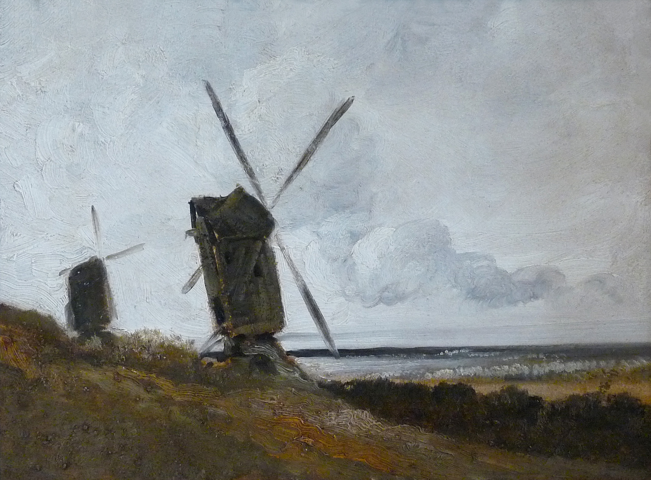 Georges Michel, Paysage avec moulins à vent, huile sur carton, date ?, Musée des beaux-arts de Strasbourg.